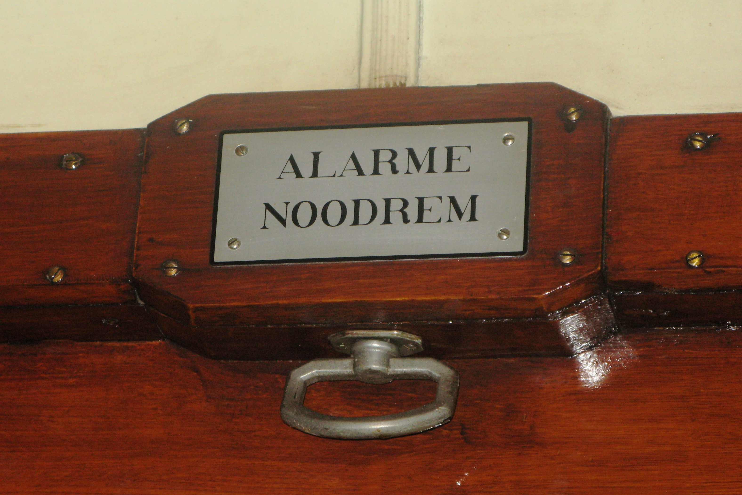 Noutbremsegrëff an enger SNCB-Voiture aus den 30er Joren. Foto geholl an der Voiture K1BD vun 1934. D'Voiture hat d'Originalnummer 29127 a leeft haut bei der ZLSM zu Simpelveld ënner der Nummer 29127-21.